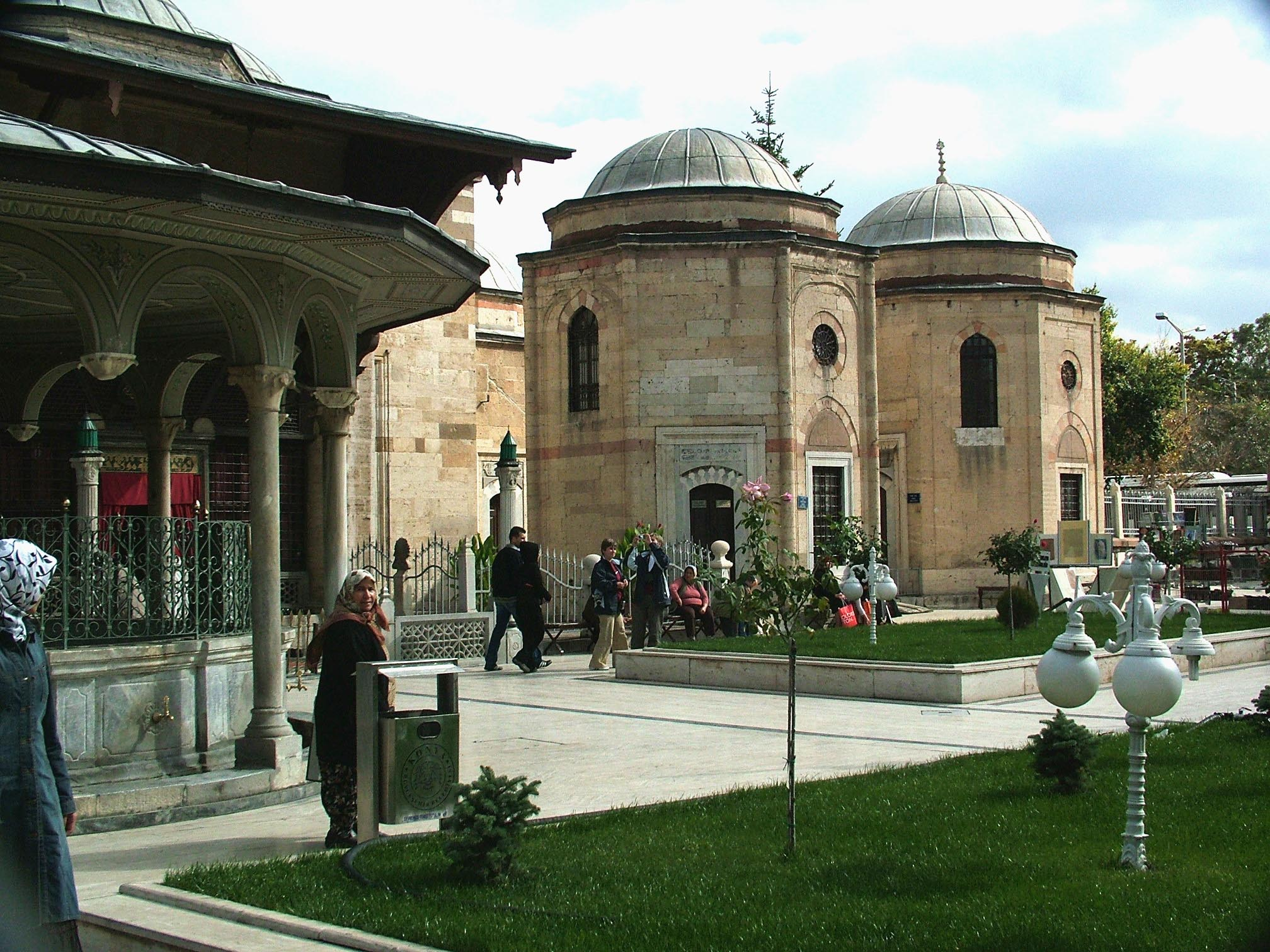 Mevlana kolostor és múzeum (Konya, Törökország)